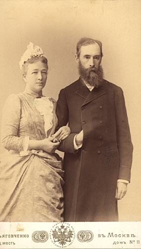 Вера Николаевна Мамонтова и Павел Михайлович Третьяков